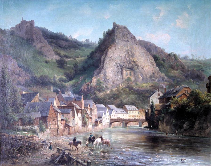 Ansicht von Oberstein, ca. 1875. Ölgemälde von van Prooyen. In Privatbesitz, photographiert mit Erlaubnis des Besitzers.